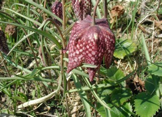 Fritillaria meleagris